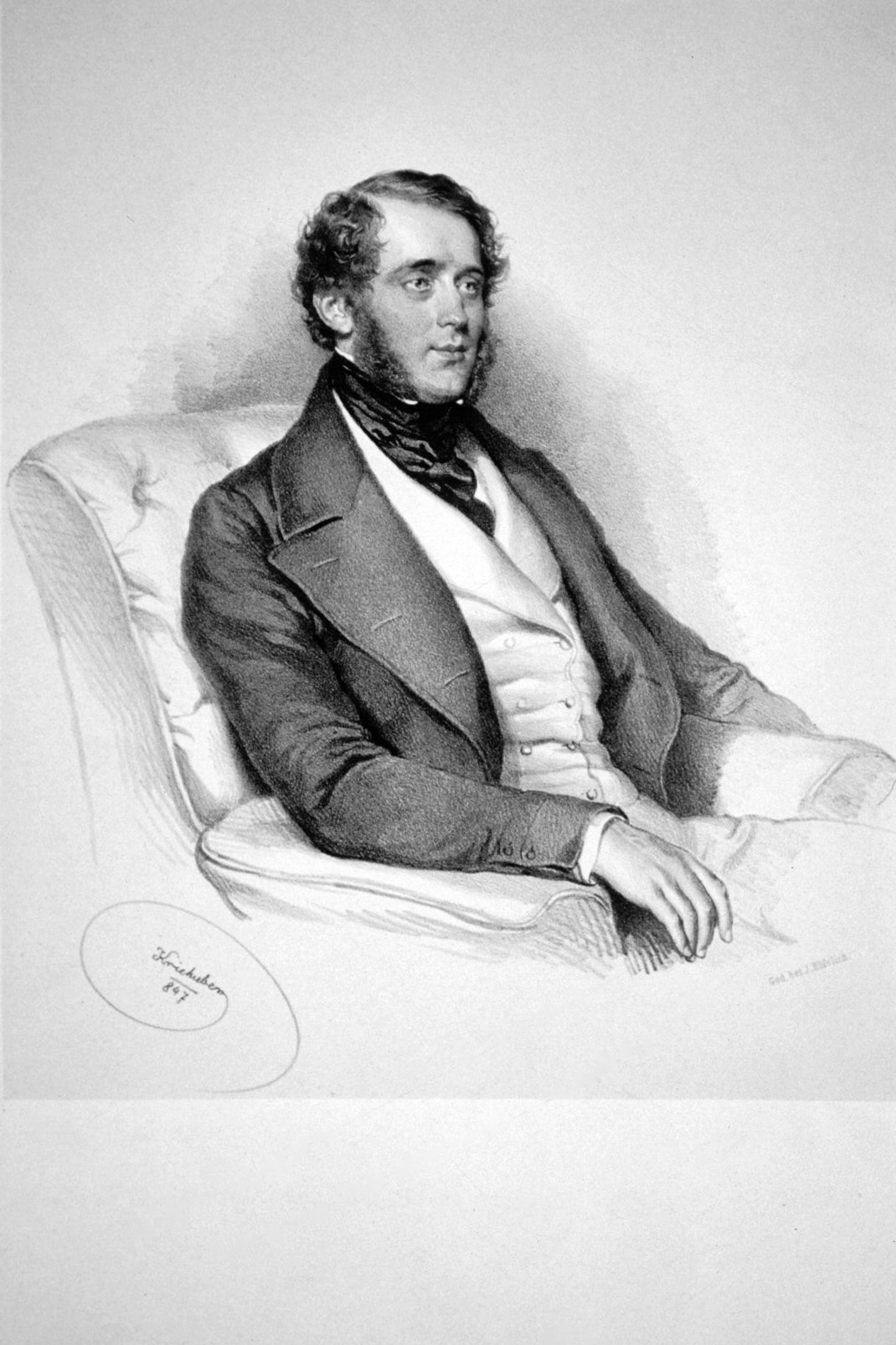 Johann Freiherr von Metzburg (1815-1889), k. k. Beamter Authority control GND: 138328684 . Lithographie von Josef Kriehuber, 1847